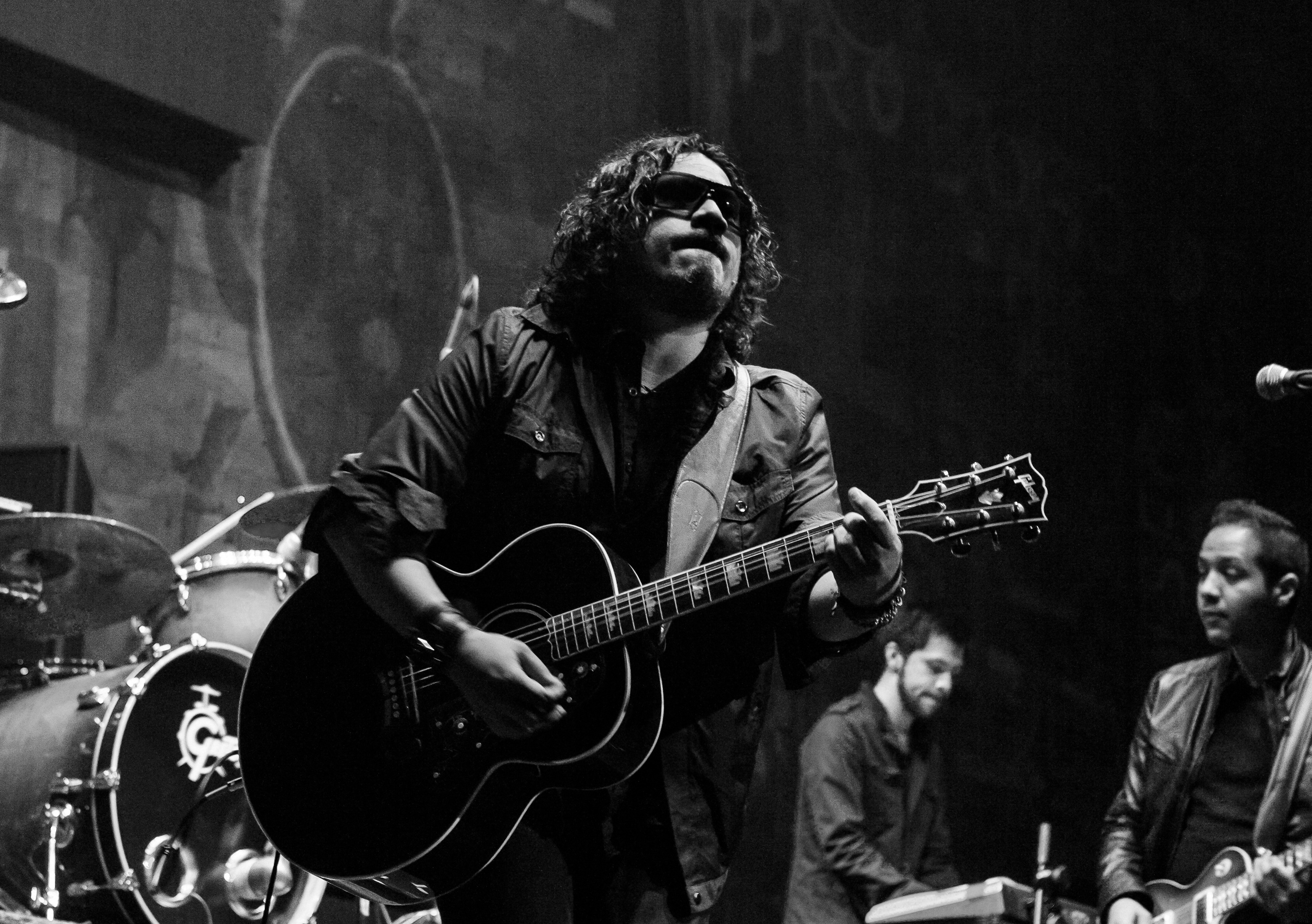 Jáuregui creador del fut-rock.